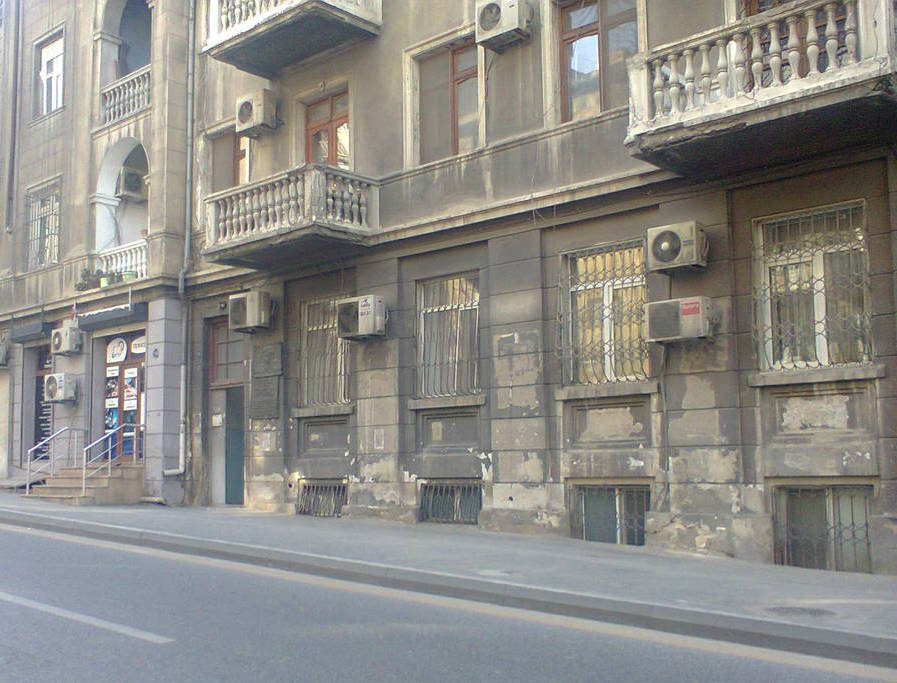 В этом доме жил Гасан Сеидбейли (при более детальном рассмотрении можно даже увидеть памятную доску)